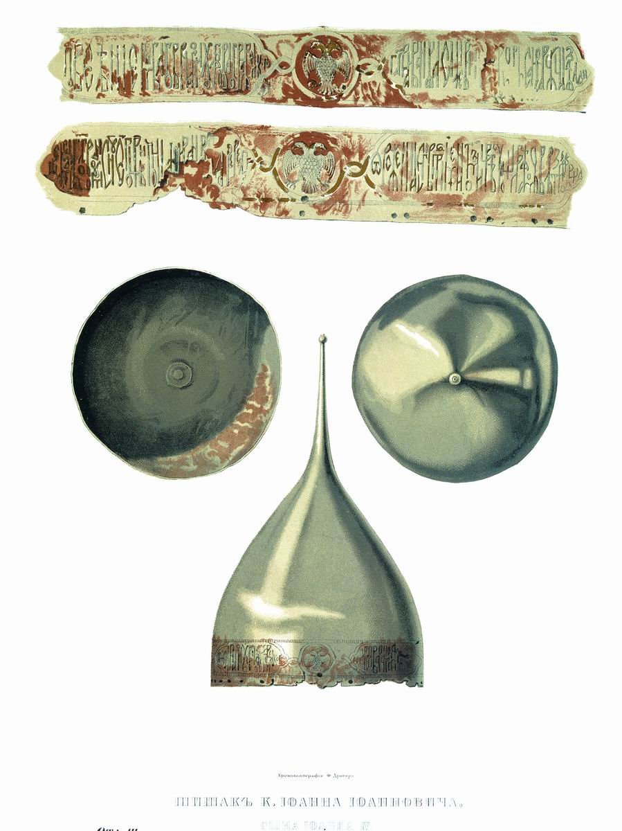 Шишак князя Иоанна Иоанновича, сына Иоанна IV Этот маленький шлем, деланный для малолетнего царевича Иоанна Иоанновича, есть образец собственно русских шлемов с еловцами, которые можно видеть на всех древних рисунках, изображающих русских воинов. К этому шлему прицеплялась кольчужная бармица полостью, прикрывающей плечи. В описи царской Оружейной казны 1687 г. этот шлем означен вторым, на обороте 468-го листа: «Шолом железной стальной, венец наведен золотом, по нарезке по мишеням слова наведены золотом, подпись делана, по повелению Блаженные памяти Государя Царя и Великаго Князя Иоанна Васильевича всея Русии, сыну его Благоверному Царевичу Иоанну Иоанновичу; меж мишеней четыре круги наведены золотом по нарезке, в них два орлика, да по два левика, подвершец наведен золотом травы чеадайские». Подпись по опушке шлема, наведенная золотом, следующая: «Повелением Благовернаго и христолюбиваго Царя Великаго Князя Иоанна Васильевича всея Русии Самодержца, сделан шелом сей благородному сыну его Царевичу Иоанну Иоанновичу, в четвертое лето от рождения его, в преименитом и царствующем граде Москве, в лето 7065 (1557), июня в 8 день».